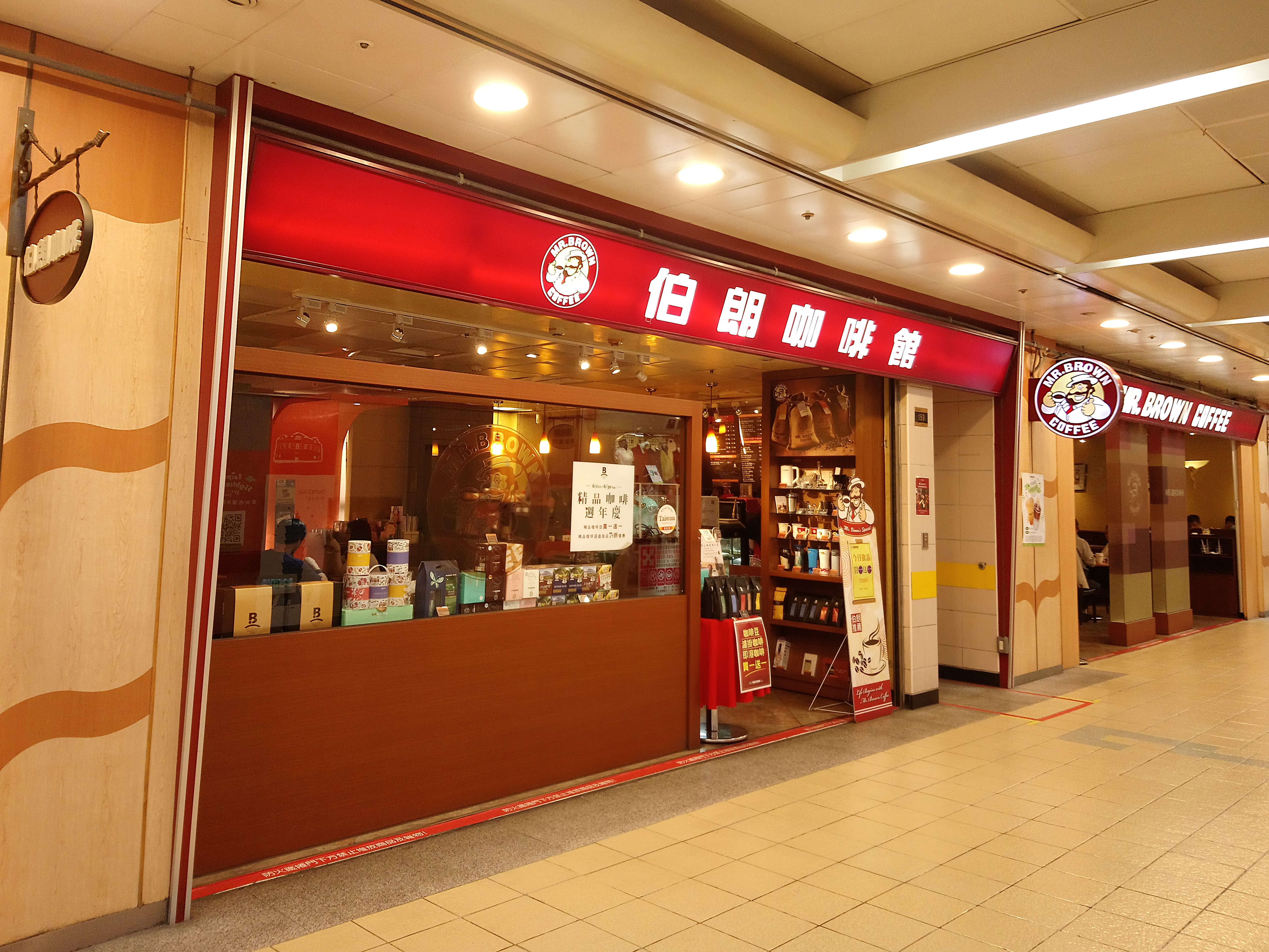 伯朗咖啡館市民店，位於台北地下街159號店。